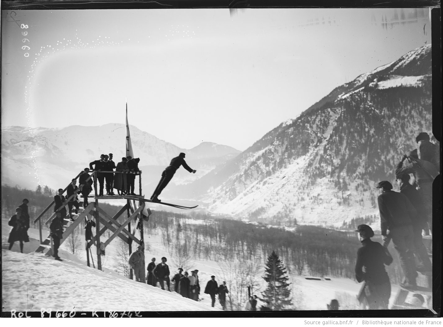 2/2/24, [jeux olympiques d'hiver de] Chamonix, le tchéco[-slovaque] Bim [saut à ski de l'épreuve du combiné nordique] : [photographie de presse] / [Agence Rol]